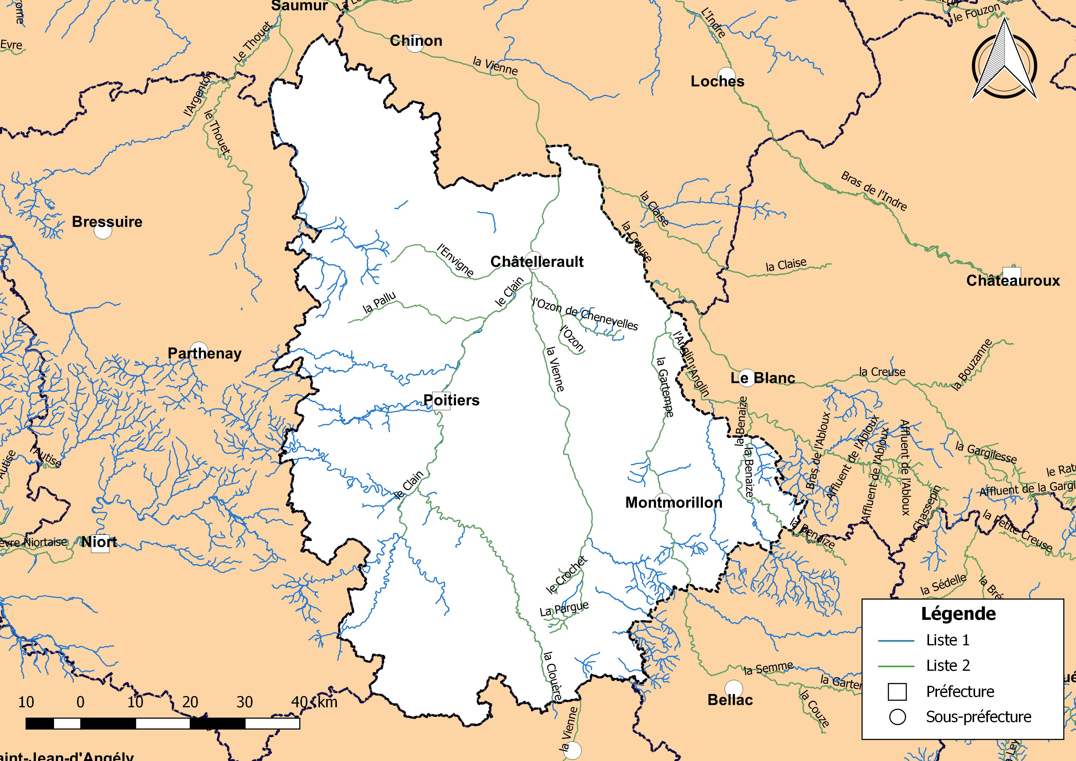 Classement des cours d'eau du département de la Vienne (France) au titre de la continuité écologique (article L214.17 I du Code de l'environnement).